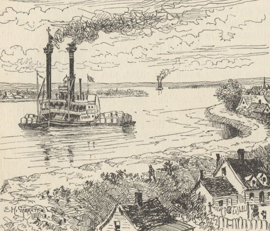 La grande ville approche et les berges du fleuve changent alors que progresse le steamer.